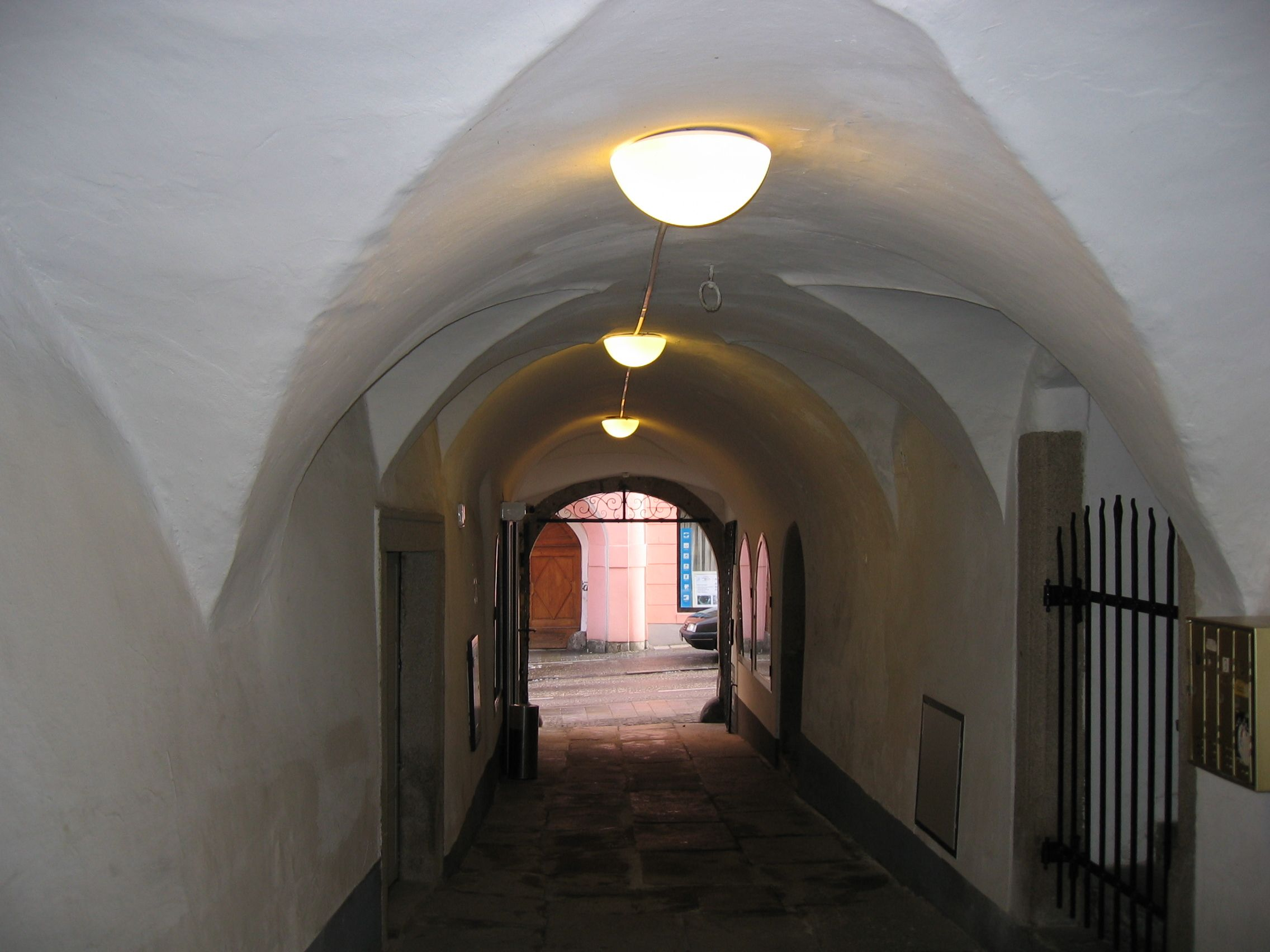 Durchgang vom Innenhof zur Böhmergasse, Freistadt